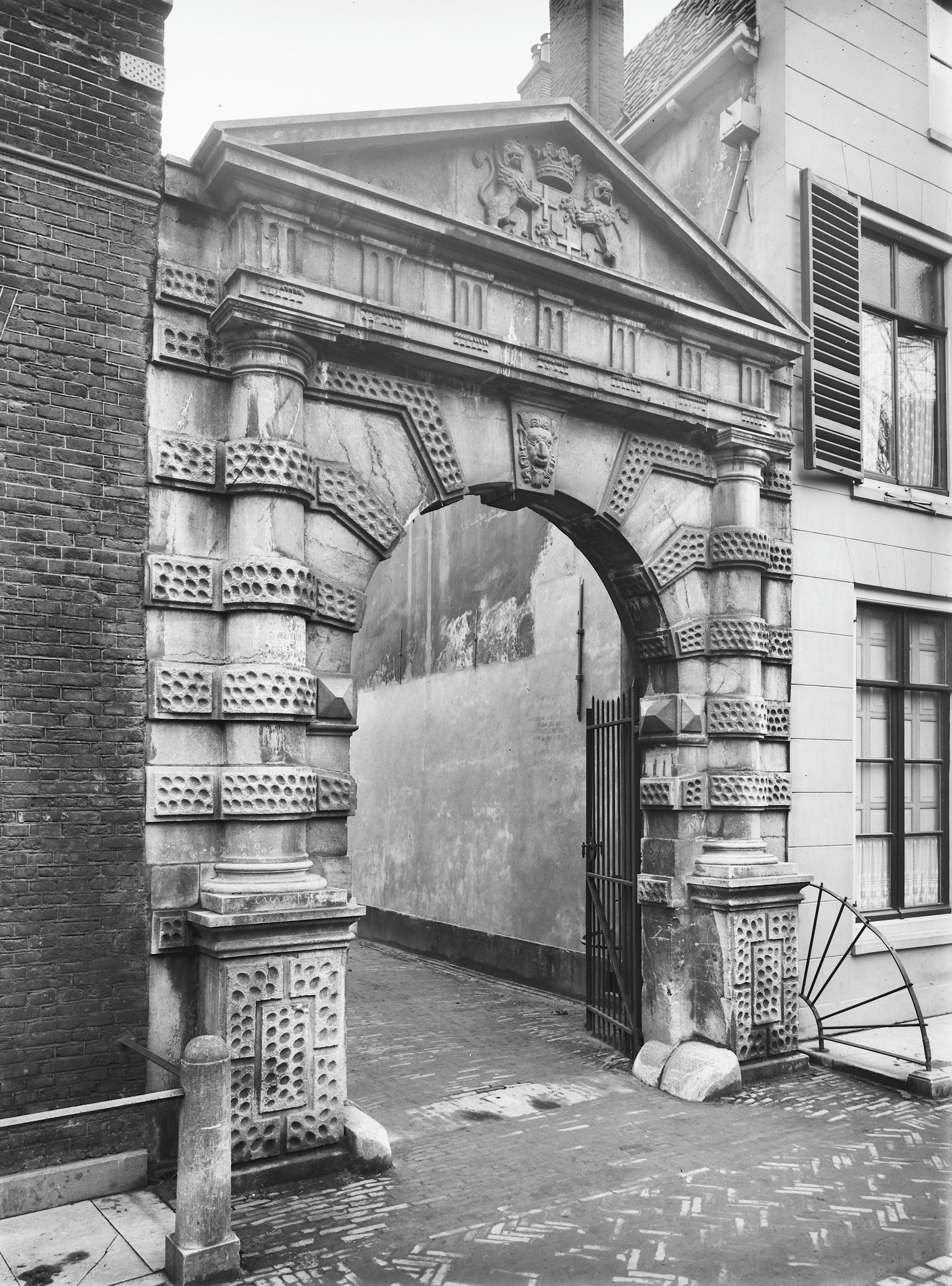 Poort van Hof van Utrecht